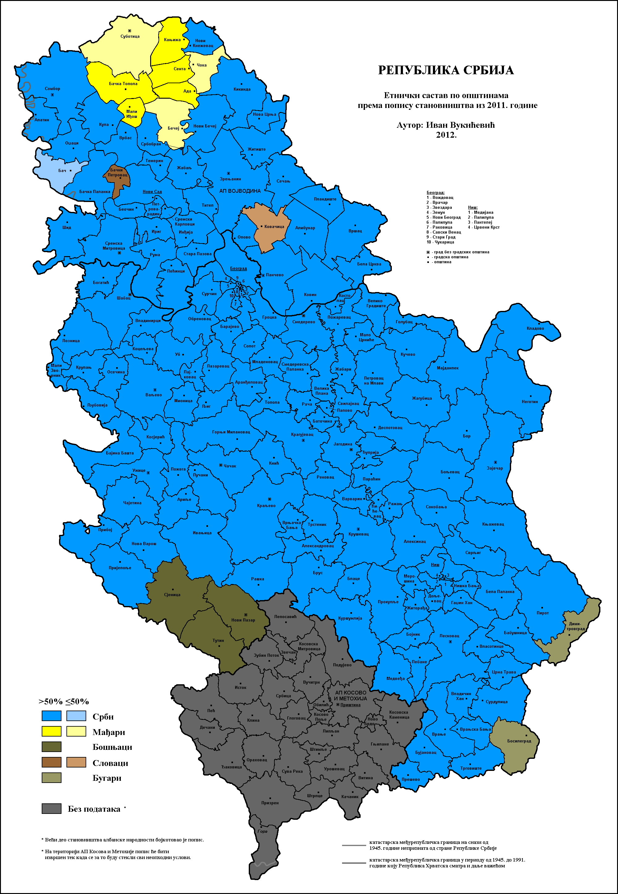 Етнички састав Србије по општинама 2011. године. Аутор: Иван Вукићевић